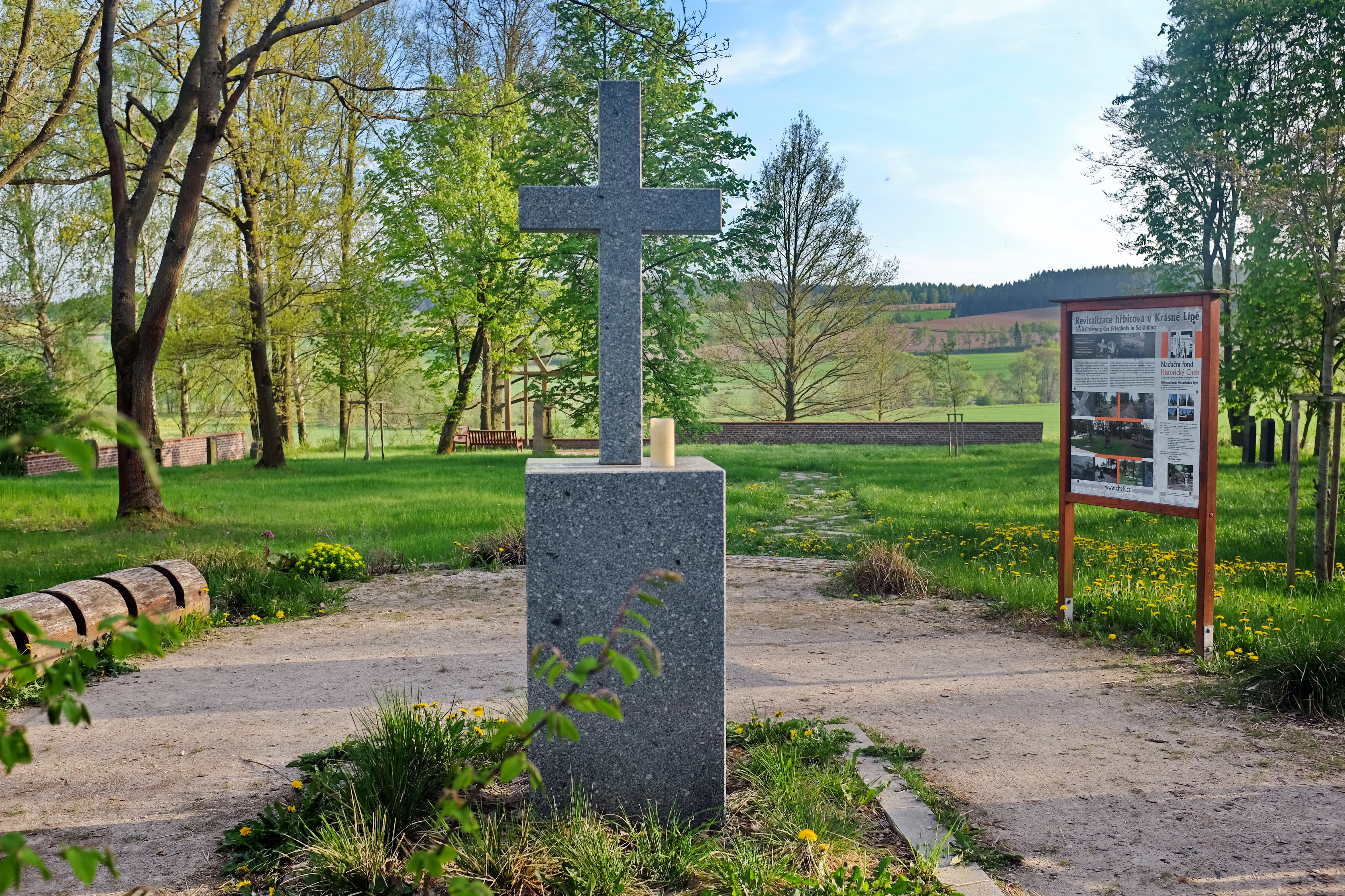 Krásná Lípa u Chebu, zaniklá vesnice, obnovený hřbitov, okres Cheb